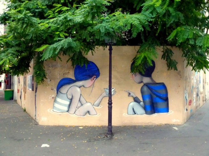 oeuvre de Seth place de la Commune de Paris, dans le quartier de la Butte-aux-Cailles